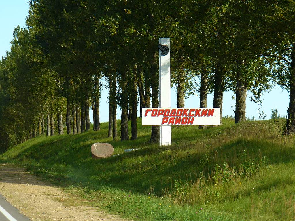 Знак на границе района. Дорога Витебск-Городок.